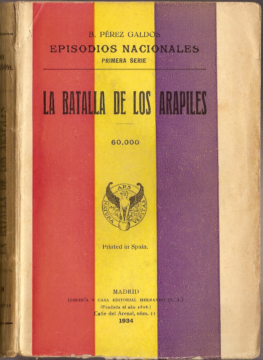 Portada del Episodio Nacional La batalla de los Arapiles, publicado por la Librería y Casa Editorial Hernando (S. A.) en Madrid, 1934